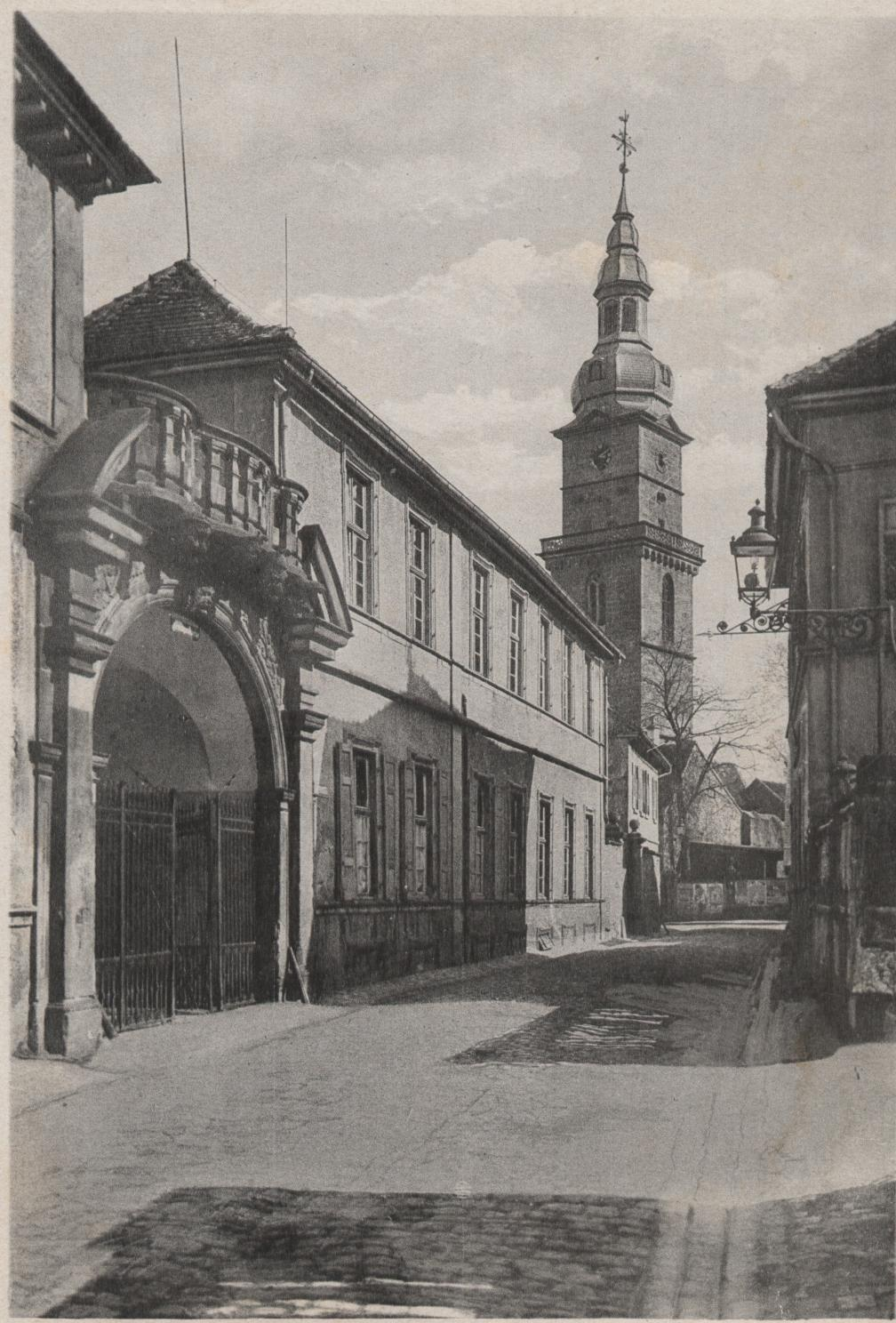 Grünstadt, Germany, Schloss Oberhof der Grafen leiningen-Westerburg-Neuleiningen